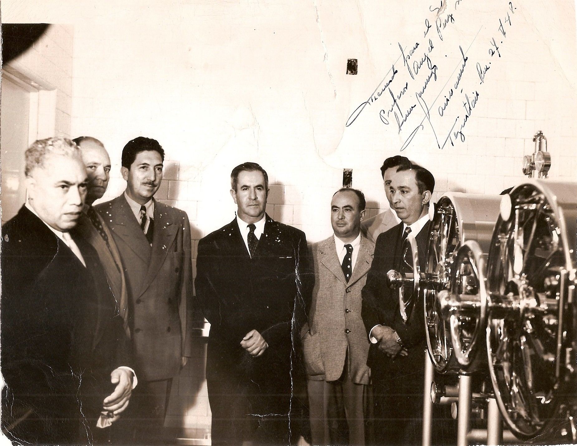 Ignauracion del Hospital Regional en Teziutlán, Puebla, México. de Izq.a derecha Prof. Angel Pérez Serrano, Lic.Miguel Alemán Valdez, Gral.Manuel Avila Camacho